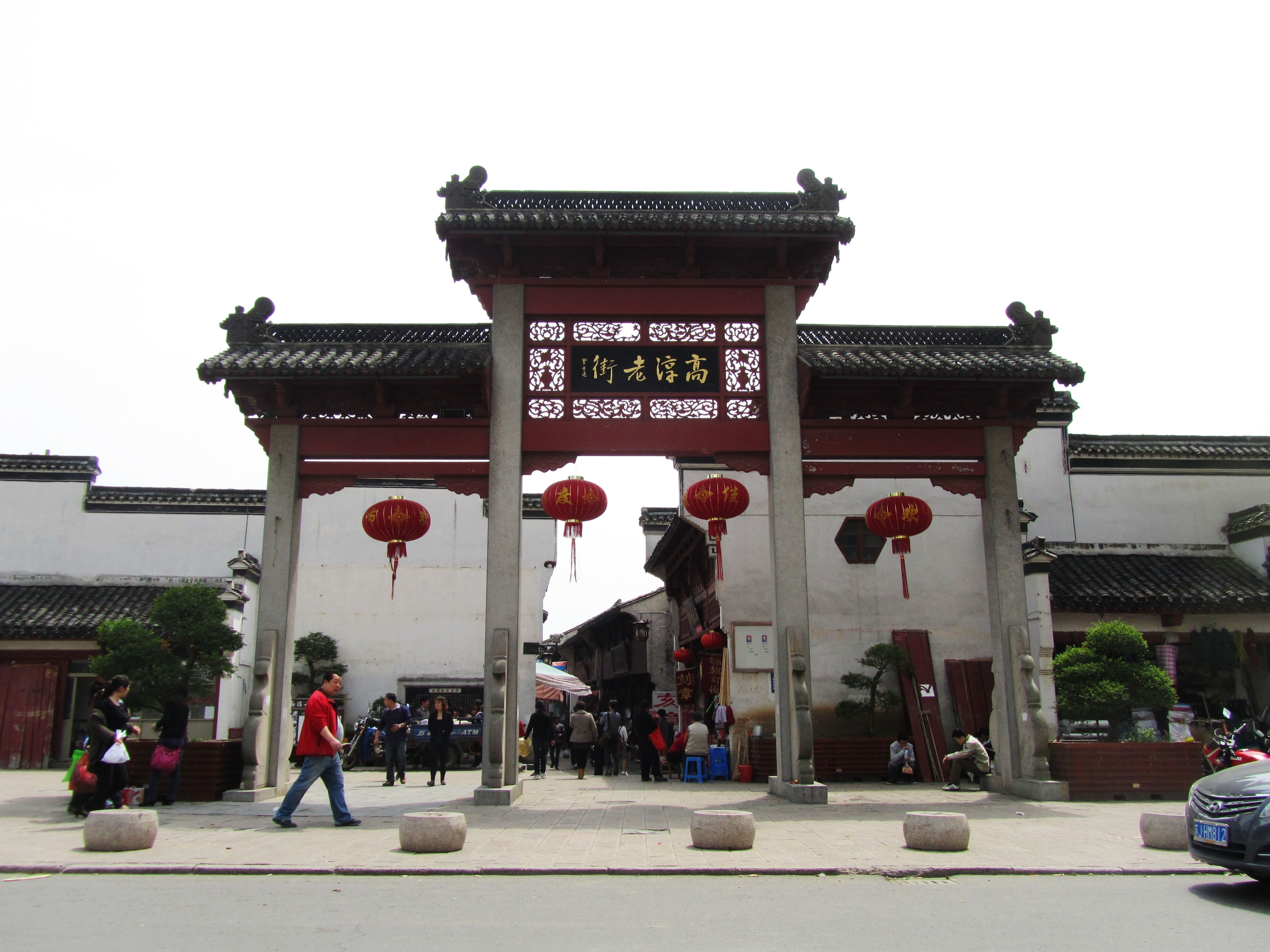 南京高淳县正仪街，又名淳溪老街。